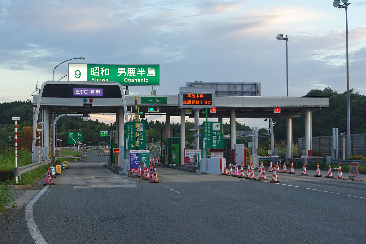 秋田自動車道 昭和男鹿半島インターチェンジ